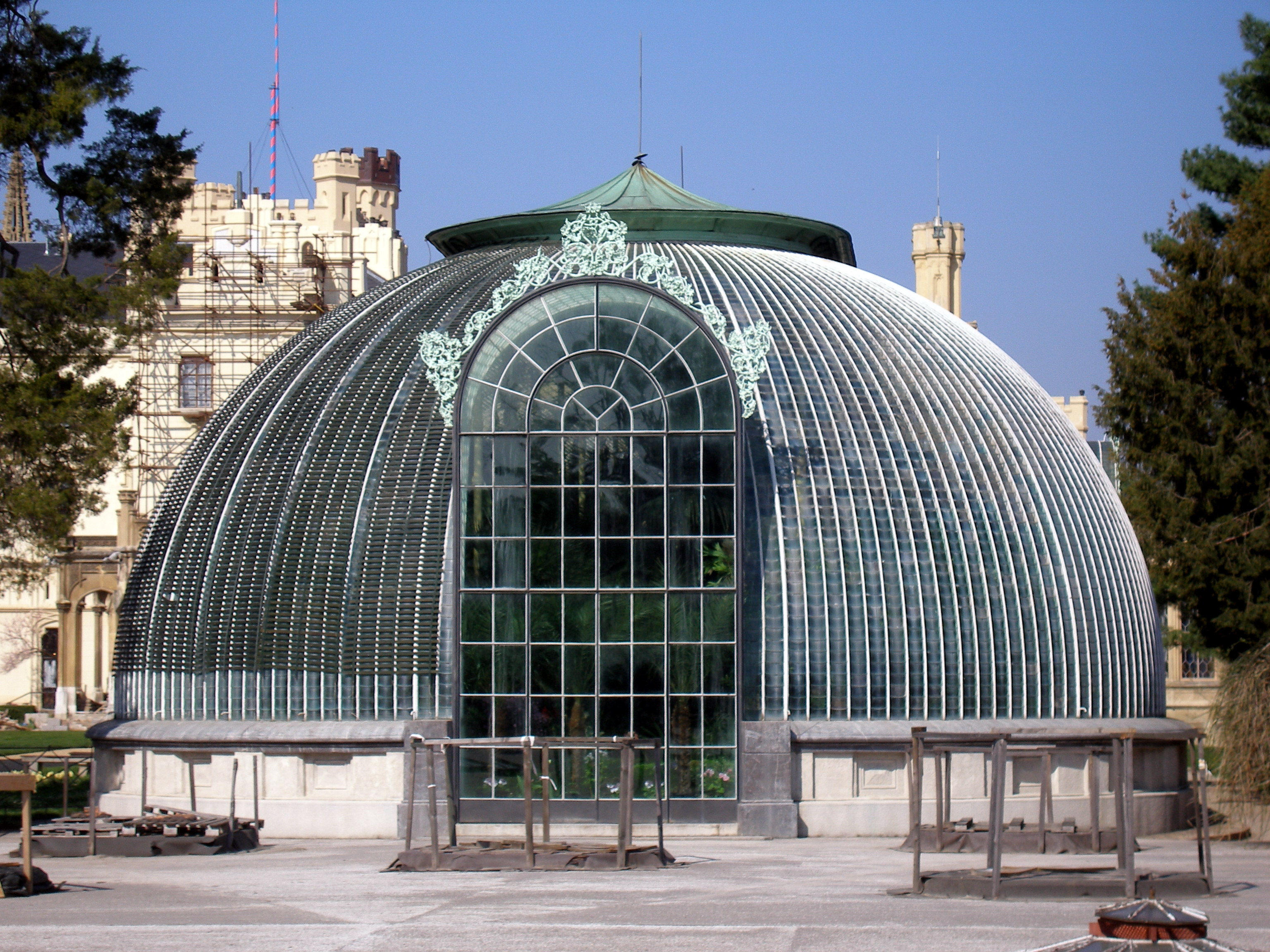 Štátny zámok Lednice na Morave Česká republika